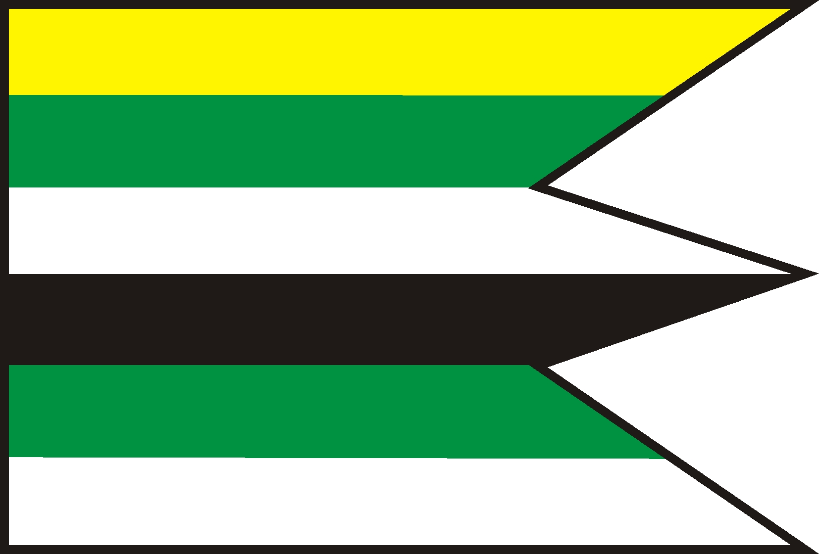 33px helix84 ✉ 21:31, 7. september 2007 (UTC)